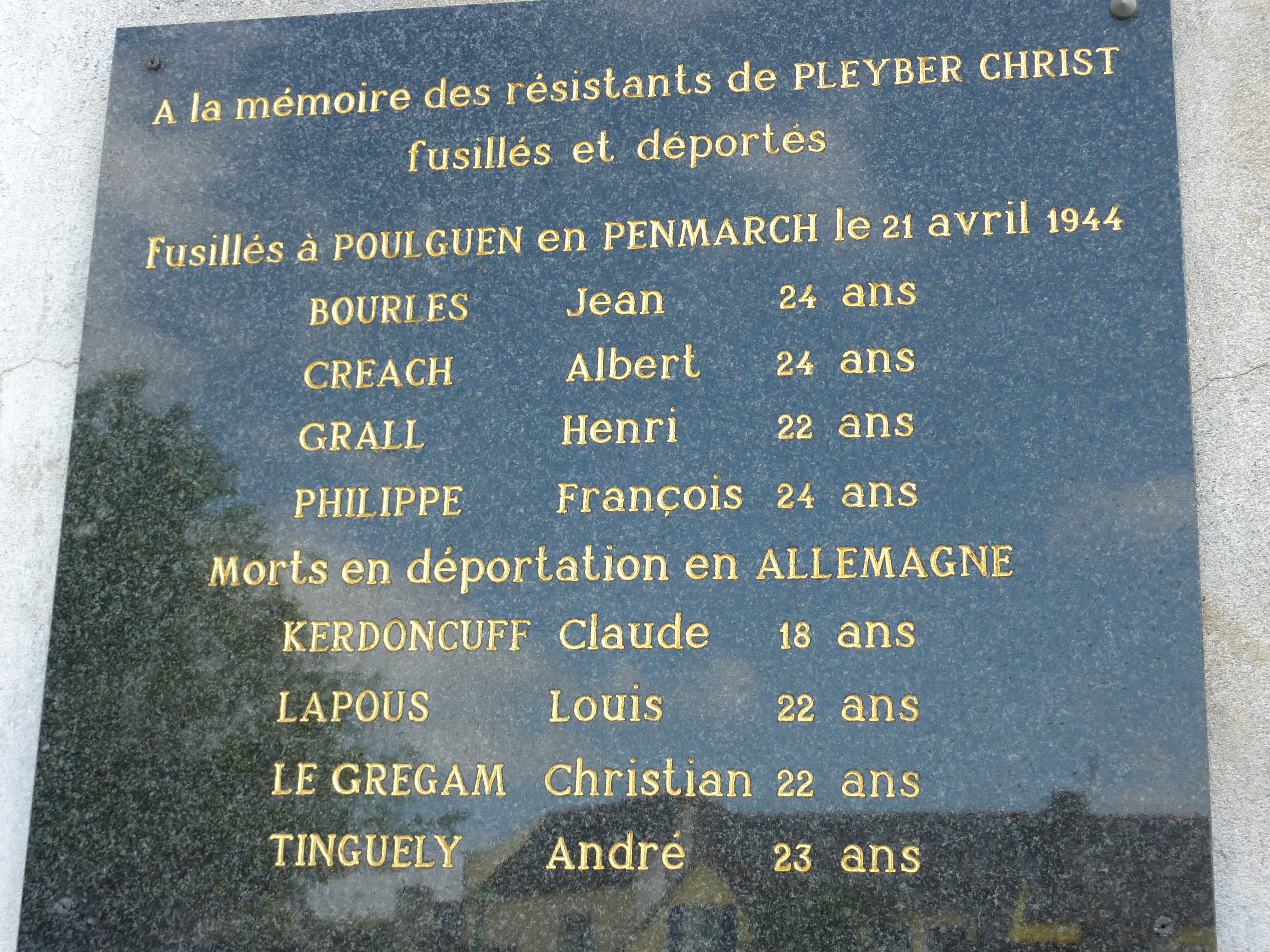 Pleyber-Christ:plaque commémorative à la mémoire des résistants fusillés ou morts en déportation de la commune